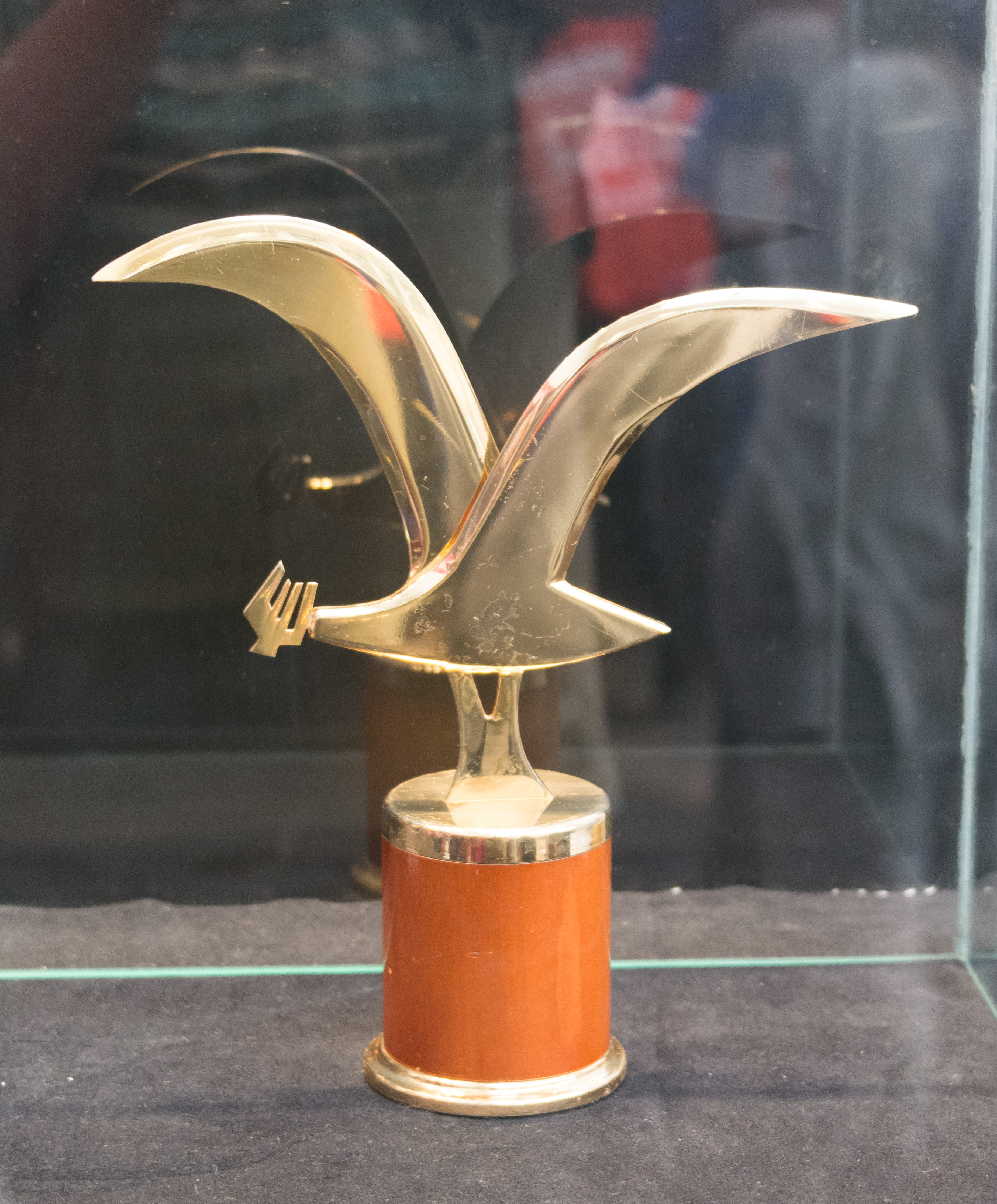 Feria vacaciones tercera edad Sernatur 2019, Providencia, Santiago, Chile.